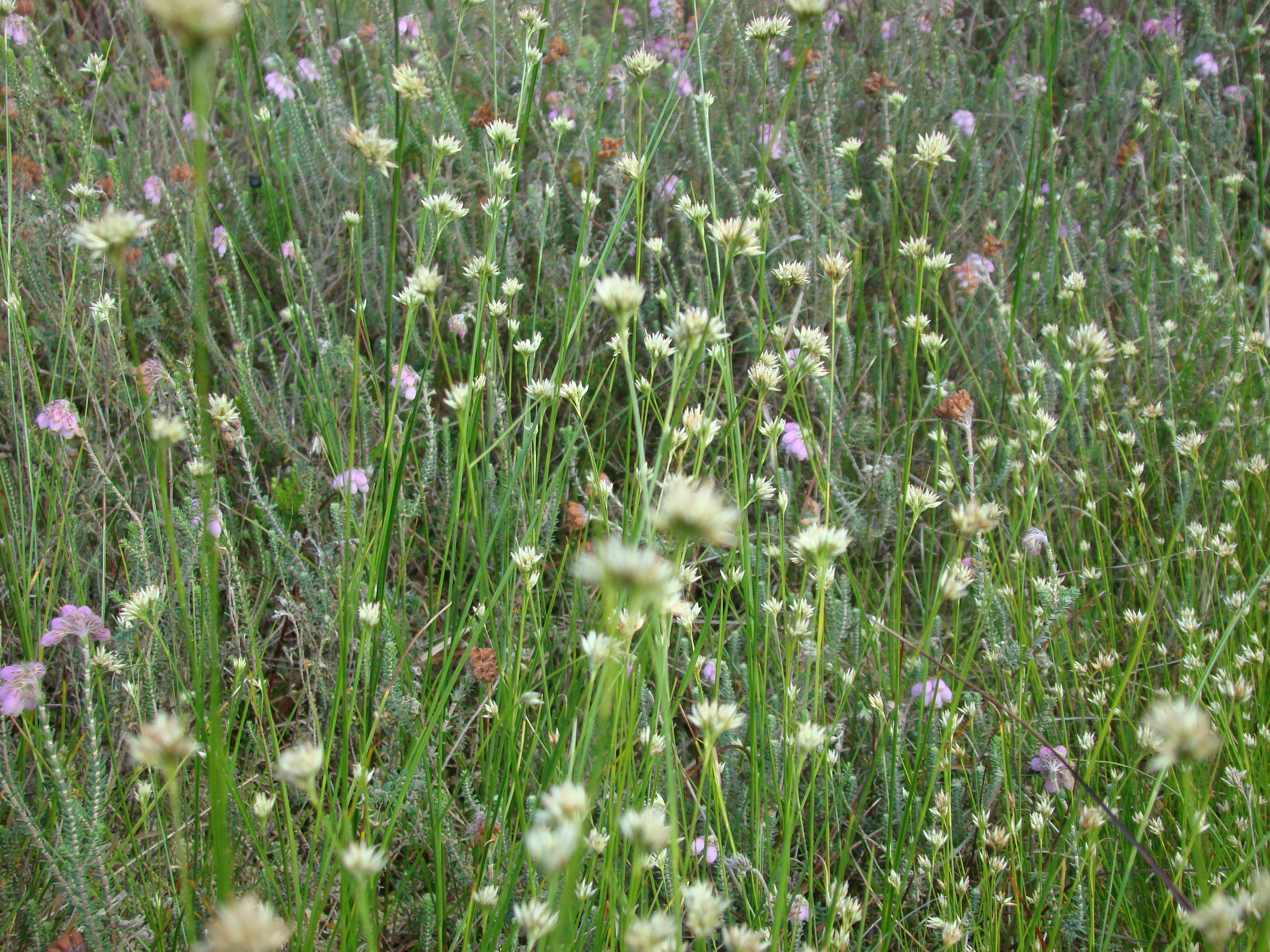 weißes Schnabelried im Gr.Moor b. Becklingen